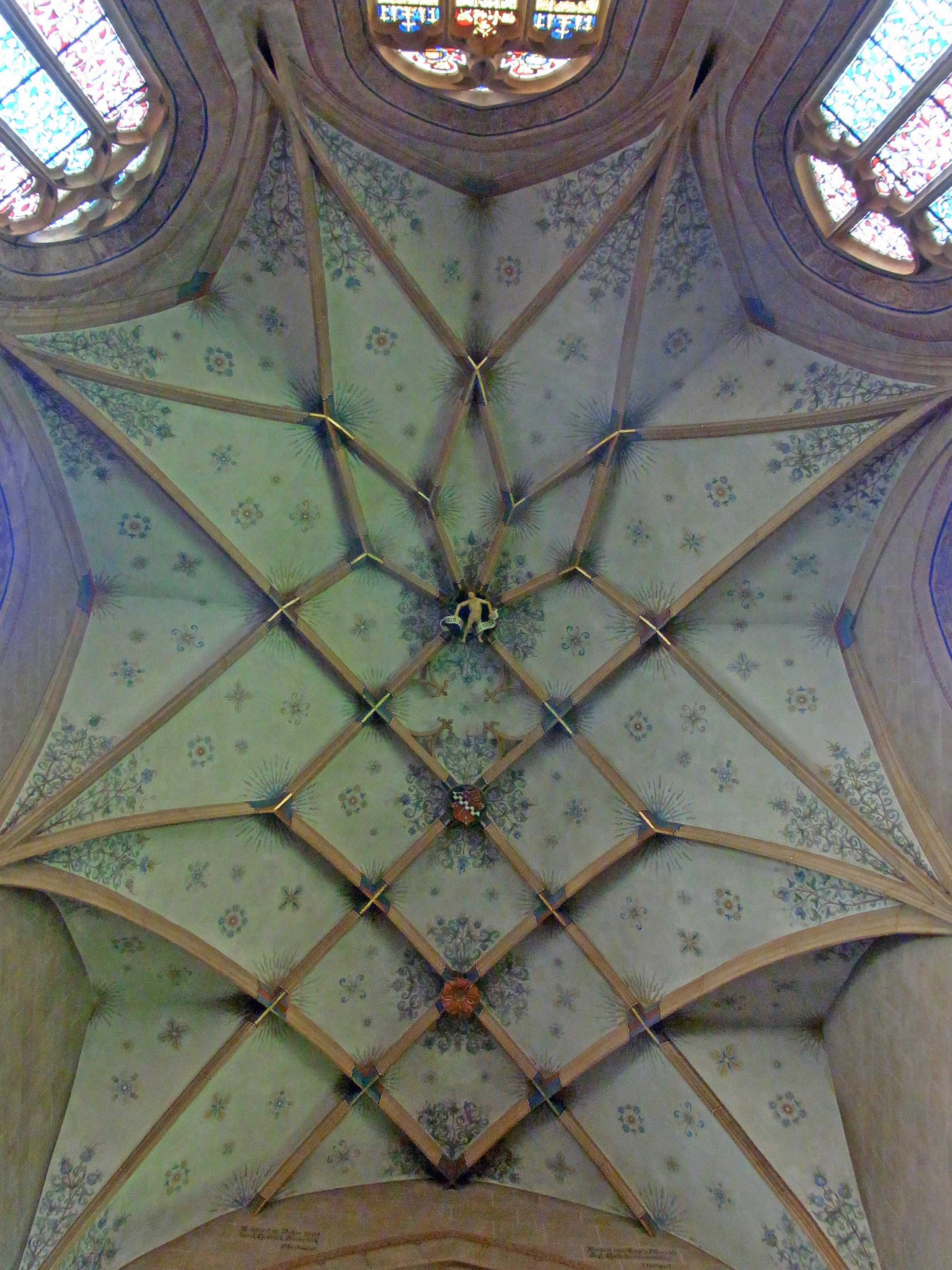 Kloster Herrenalb: Klosterkirche, innen; Deckengewölbe